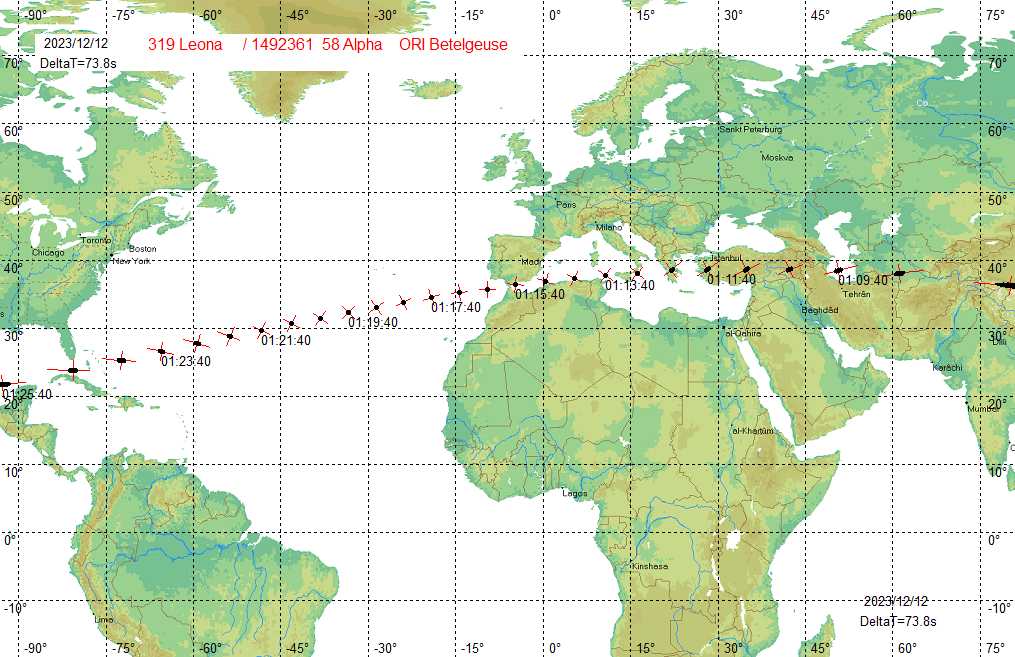 Pfad der Bedeckung des Sterns Beteigeuze durch den Asteroiden (319) Leona am 12. Dezember 2023